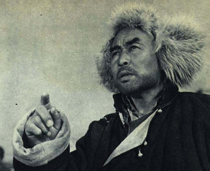 1962-07 1962年 崔嵬在电影《红旗谱》中